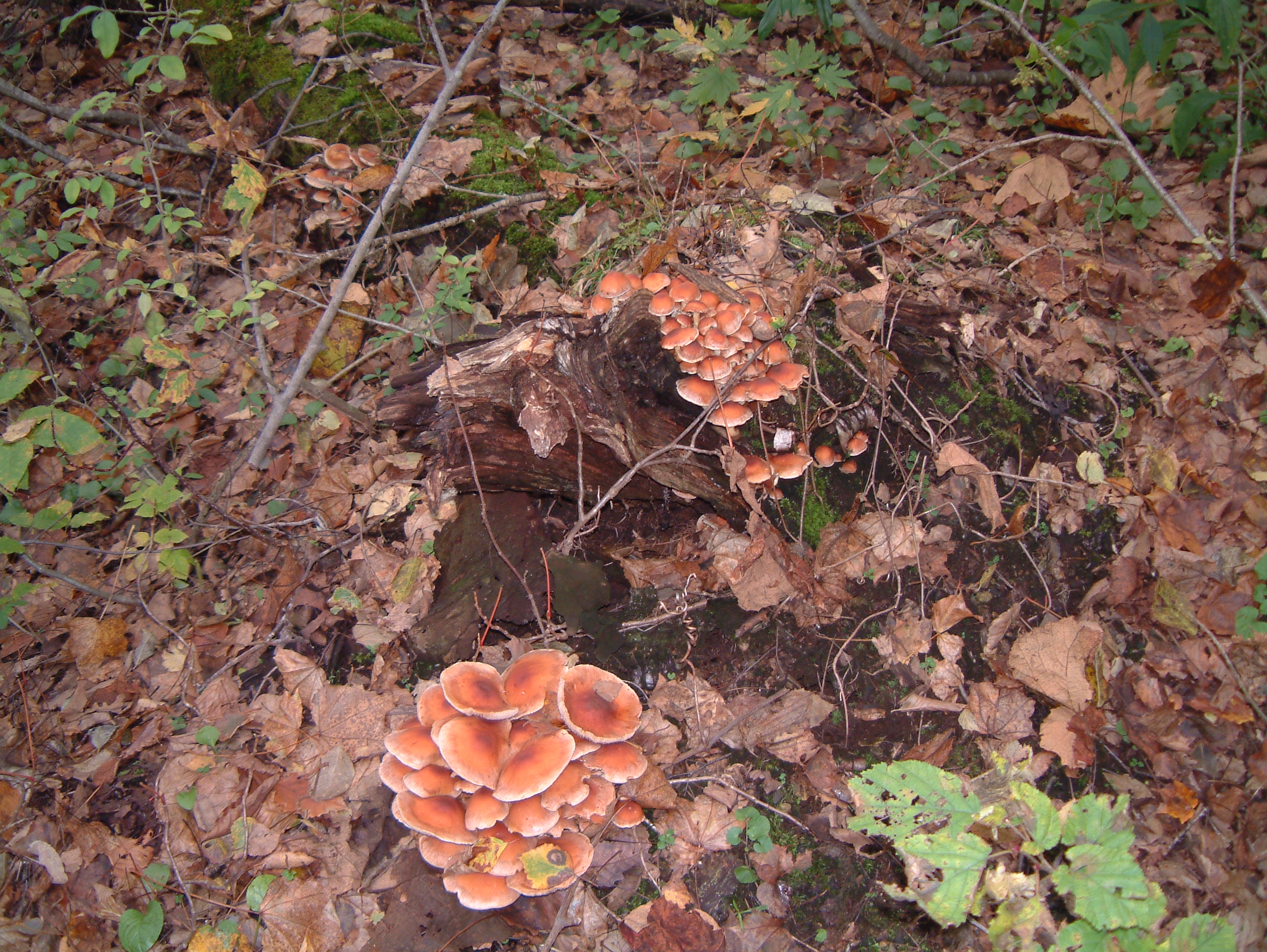 クリタケ 群馬県武尊山にて撮影